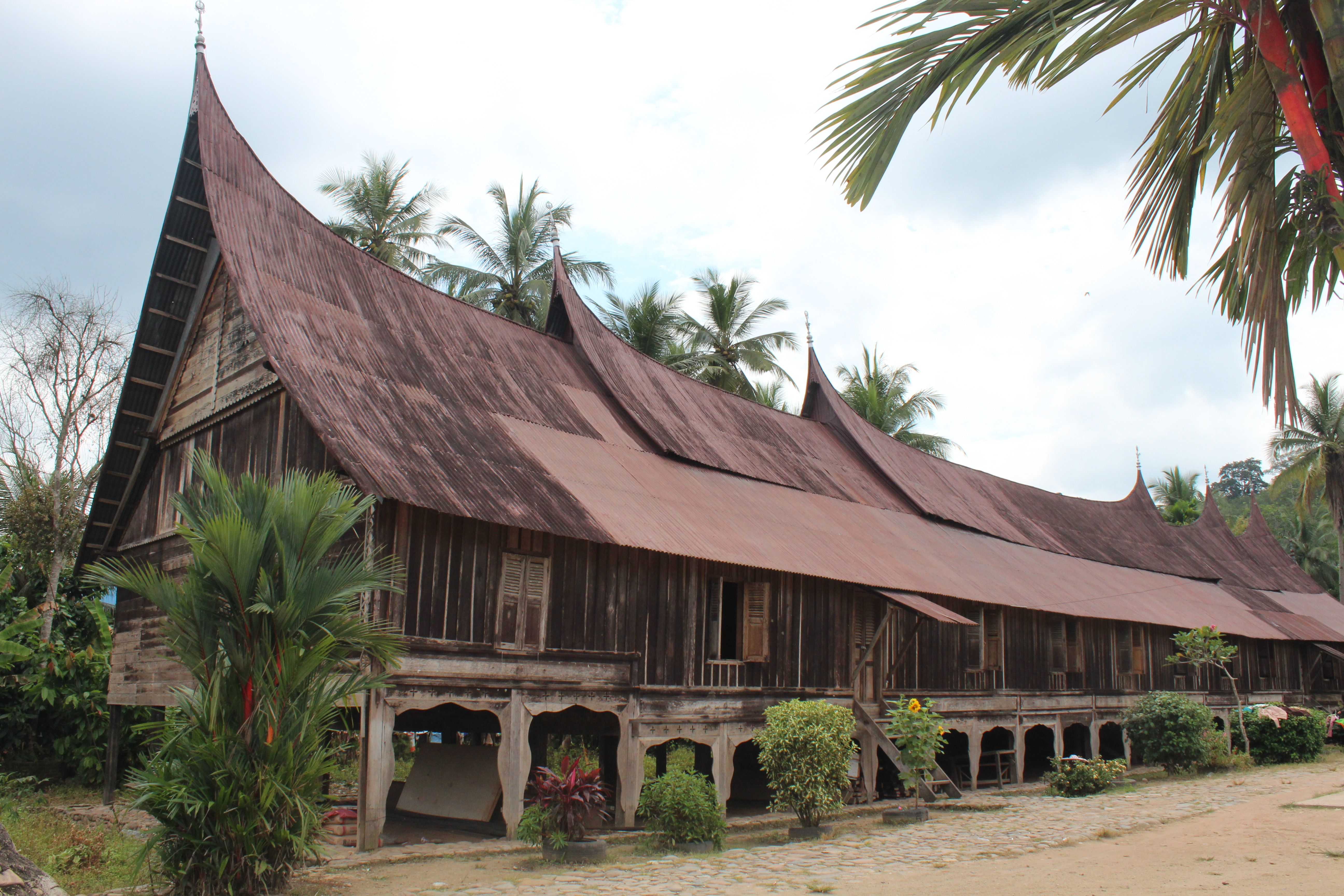 Rumah Gadang 13 Ruang Suku Dalimo